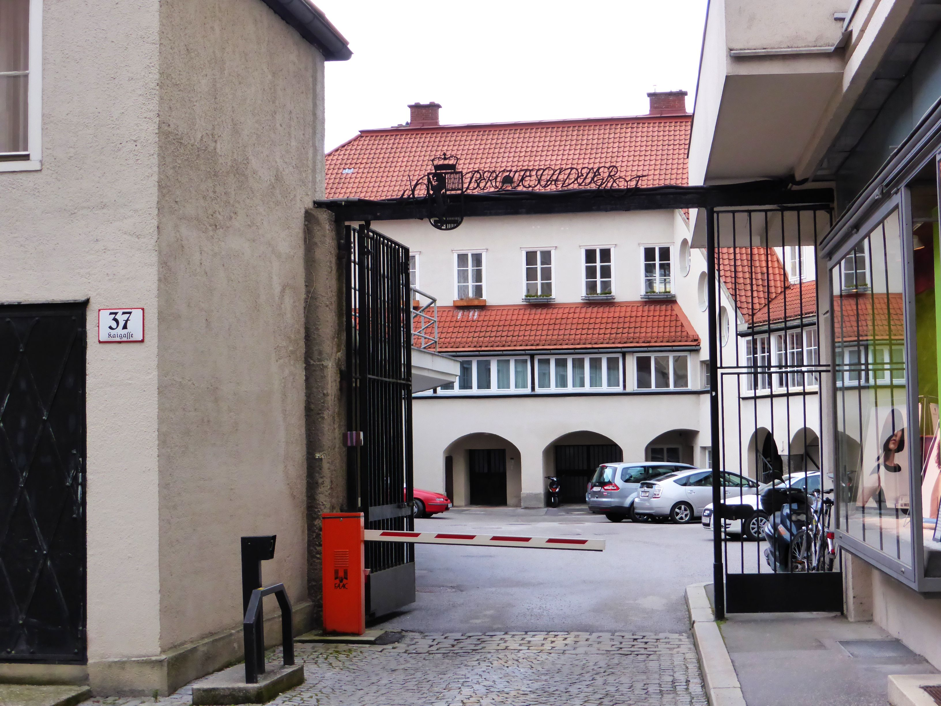 Berchtesgadener Hof (Einfahrt)